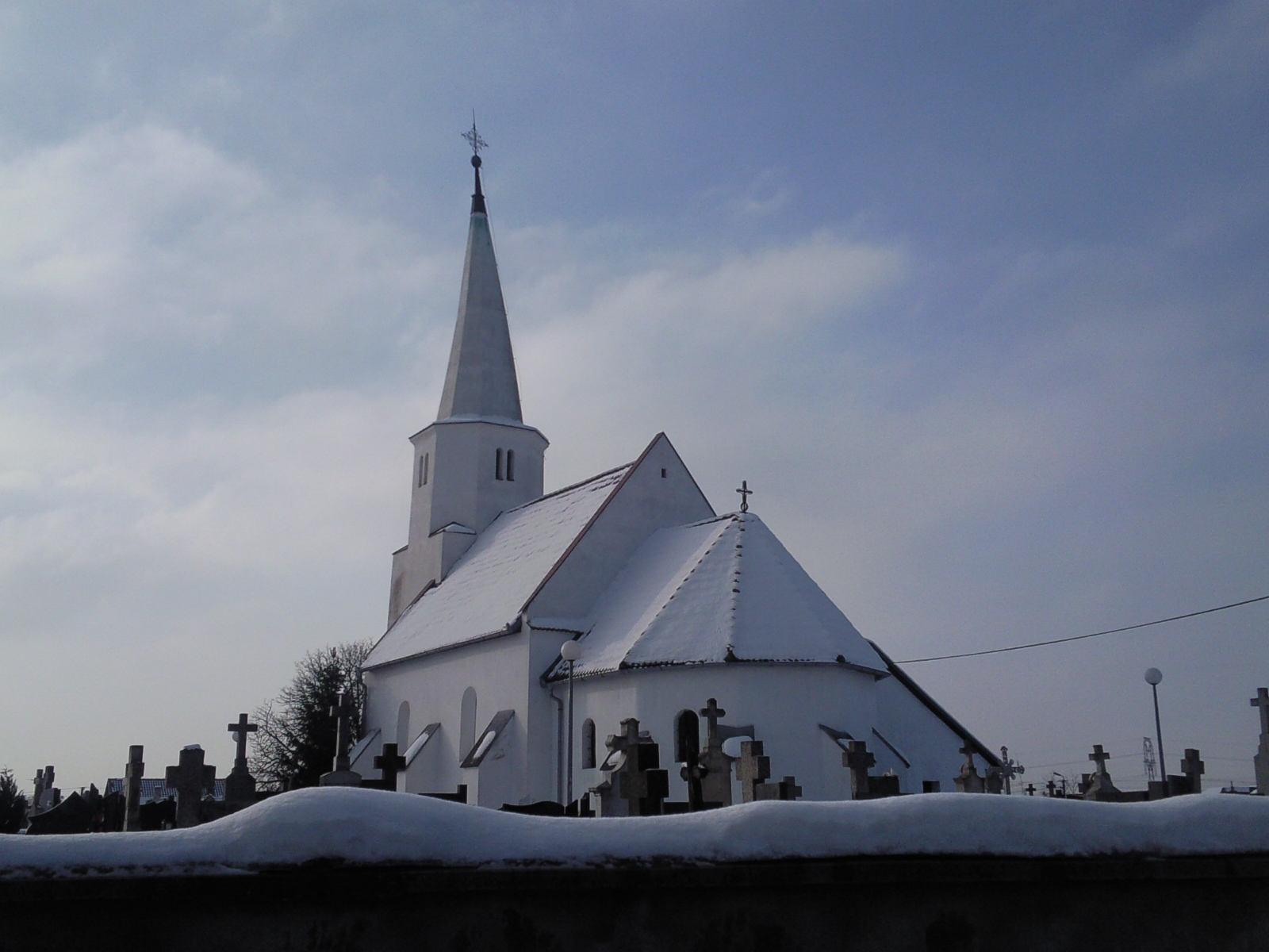 Starý kostol v zime